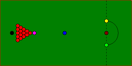 Kleuren verbeterd van vorige, zelfgetekende versie